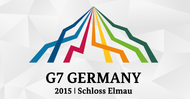 Logo von G7-Gipfel Schloss Elmau